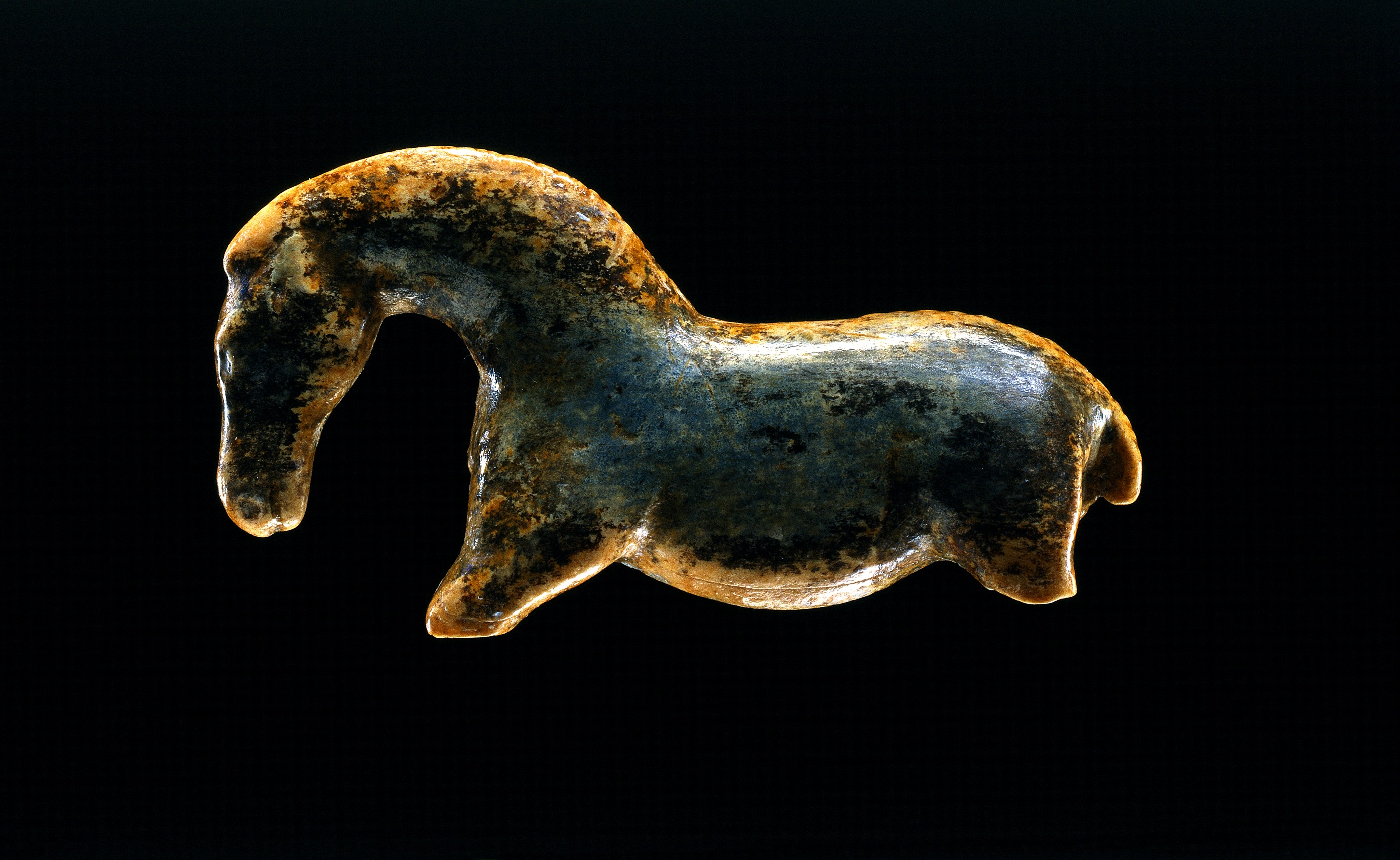 Wildpferd, Tierplastik aus Elfenbein, Vogelherdhöhle Grabung Gustav Riek 1931.